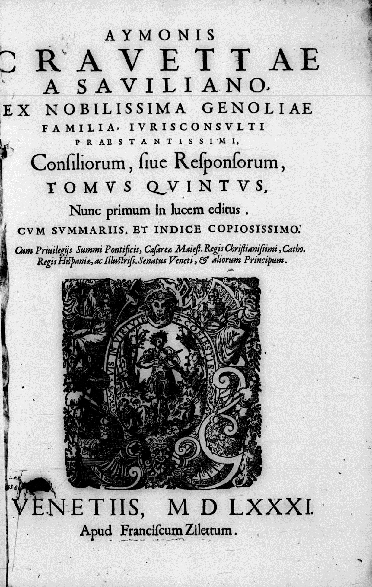 Frontespizio